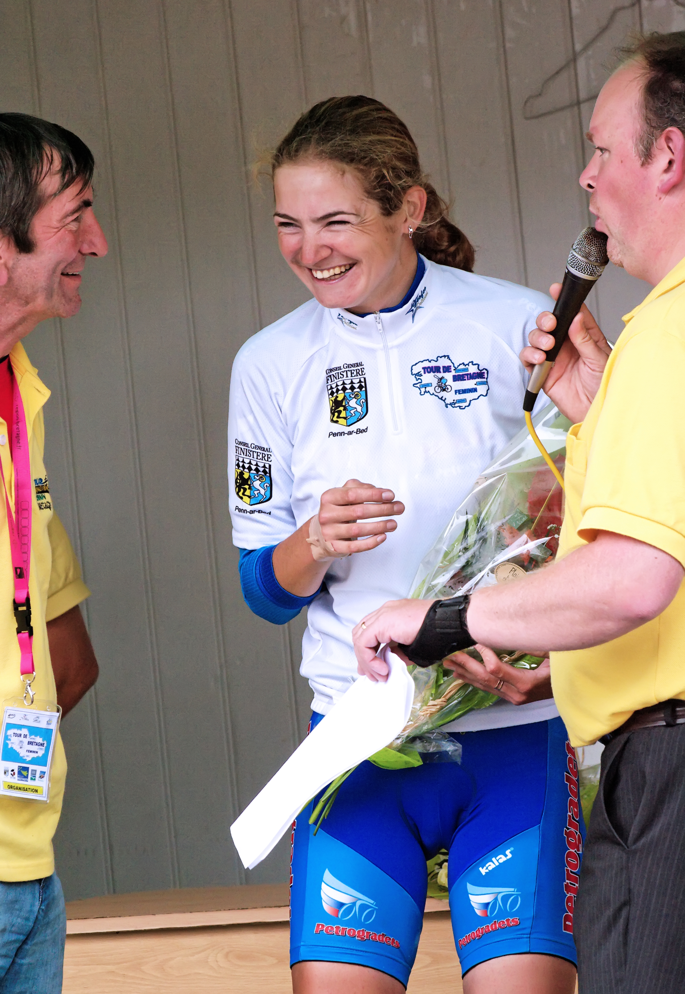 Alexandra Burchenkova at the Tour de Bretagne Féminin 2009